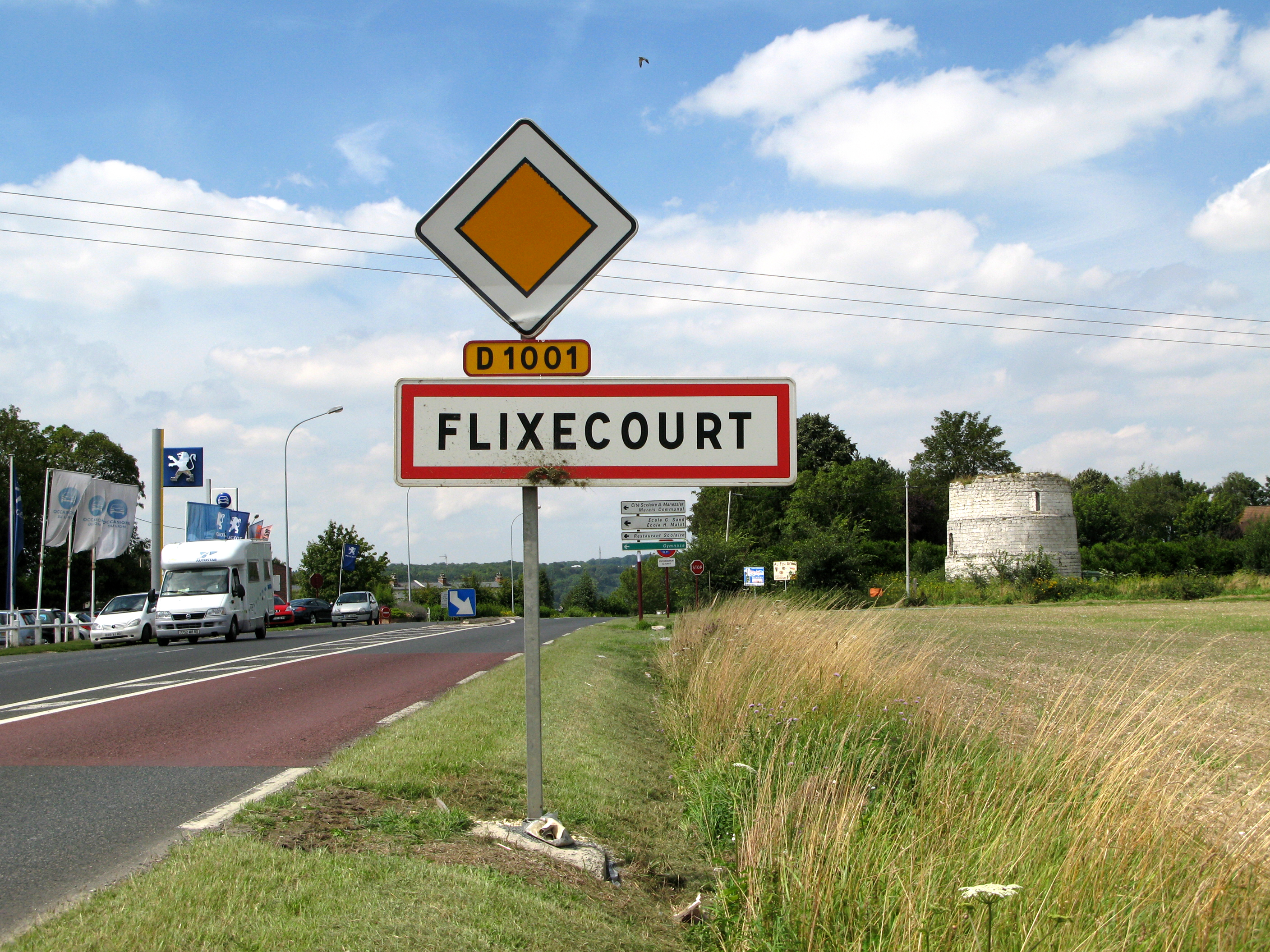 Flixecourt (Somme, France) - Entrée dans la commune par l'est, en venant d'Amiens. A droite, on remarque la tour en ruines de l'ancien moulin de pierre.